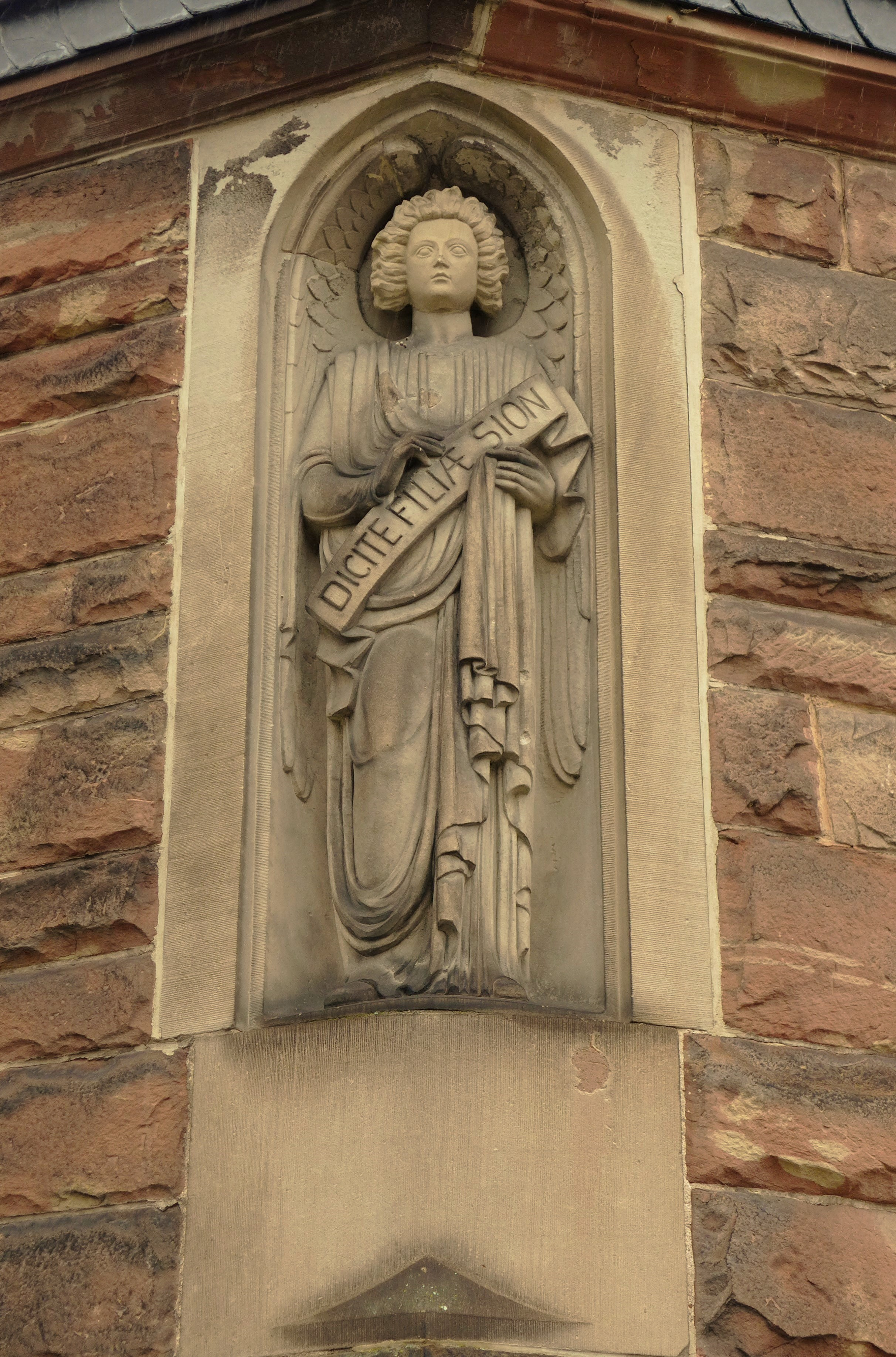 Christkönig-Kirche (Saarbrücken), Engel am Paradies-Atrium